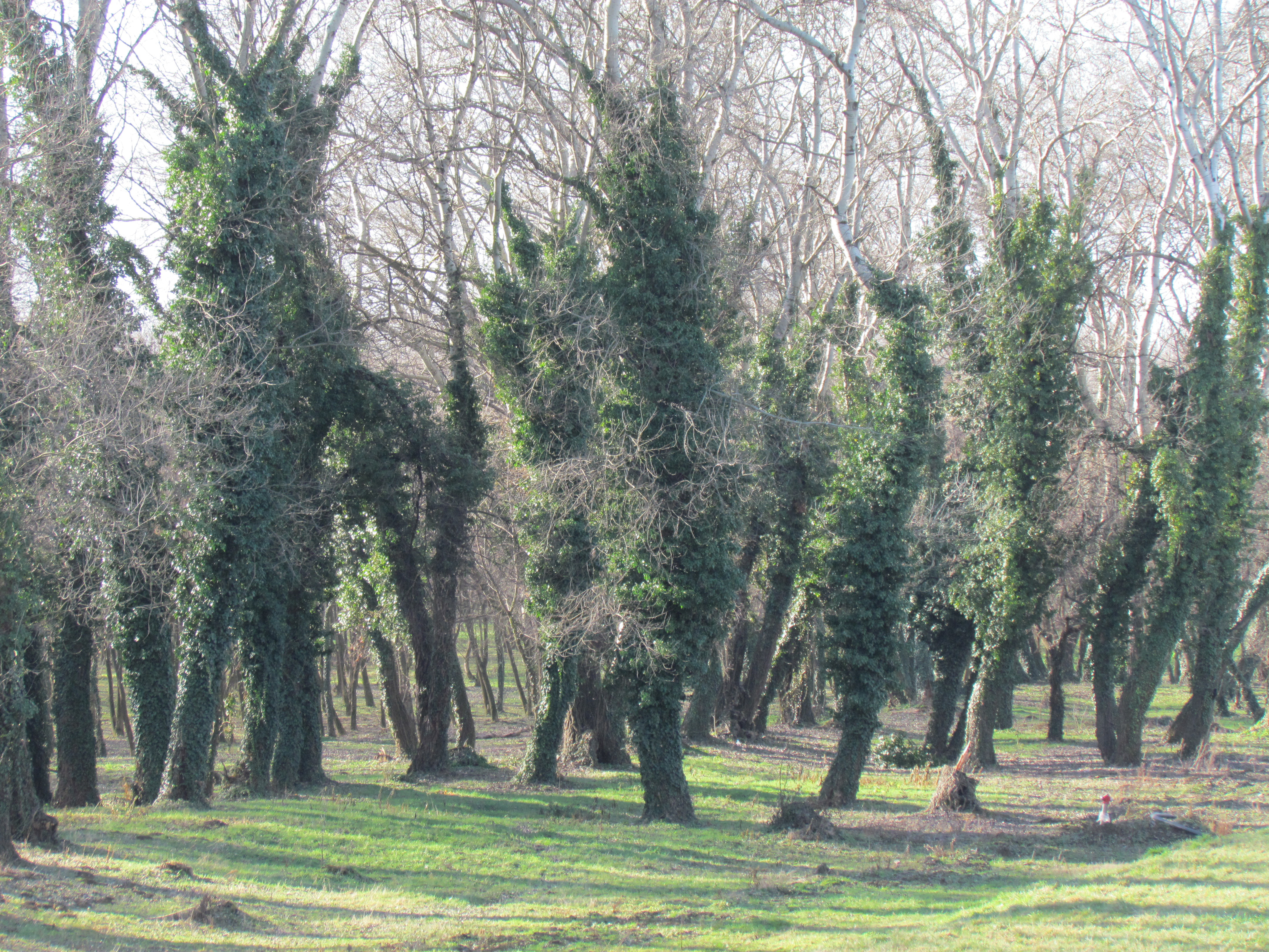 Заједница беле тополе на Ади Циганлији (фото: Михаило Грбић)